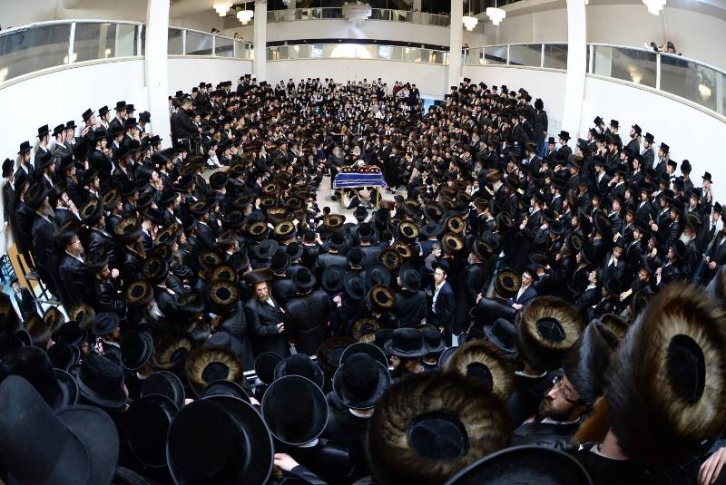 חסידי נדבורנה בהכנסת ספר תורה לבית הכנסת